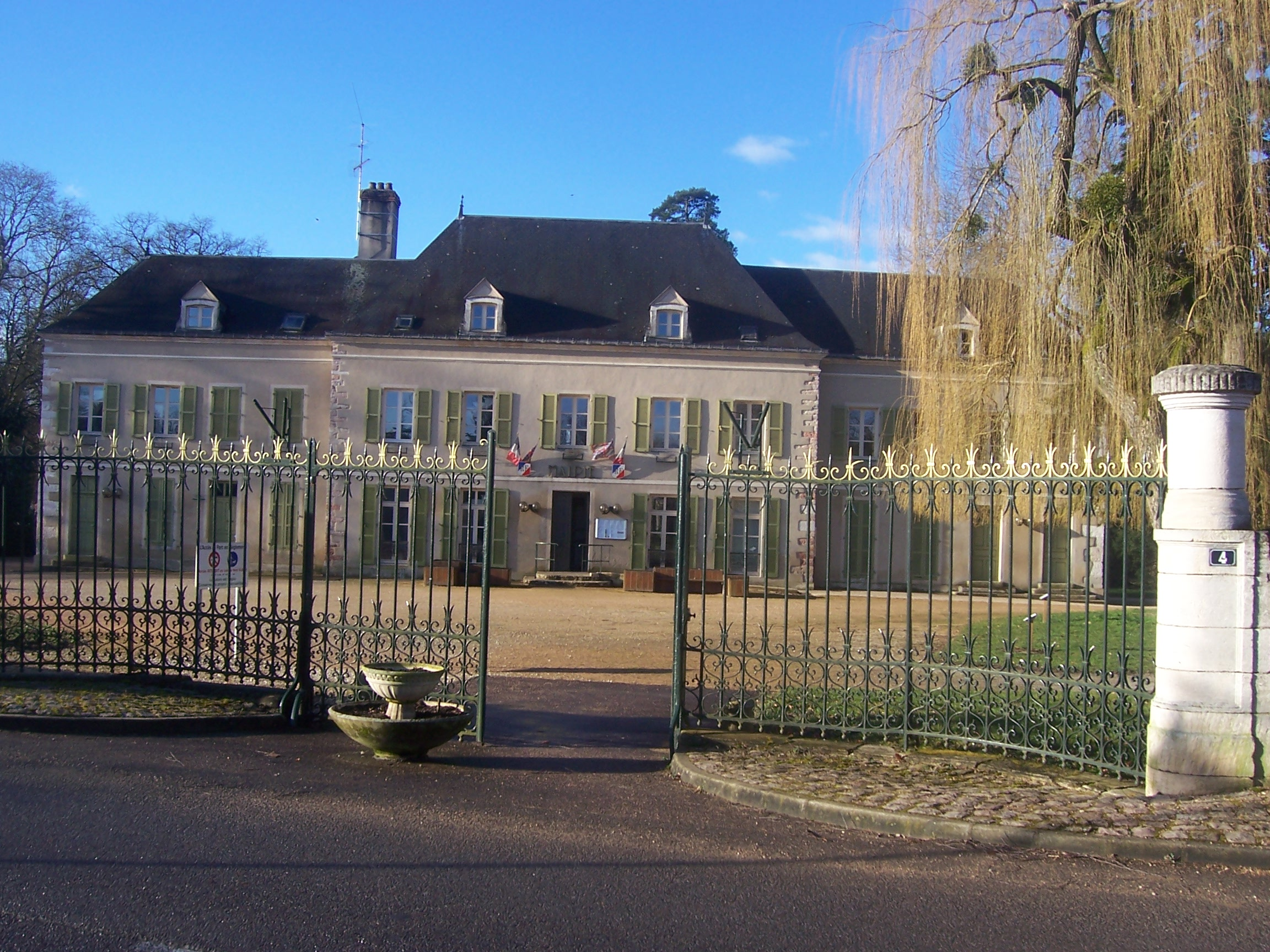 Châtenoy-en-Bresse Mairie